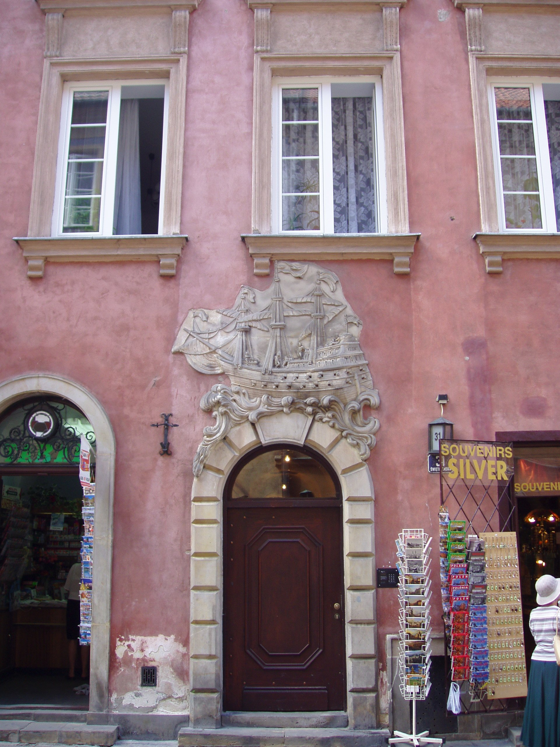 Kamienica Pod Okrętem w Warszawie